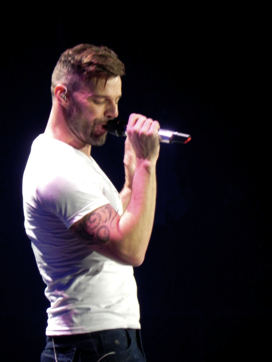 Ricky Martin en concierto en Chicago, 2011.